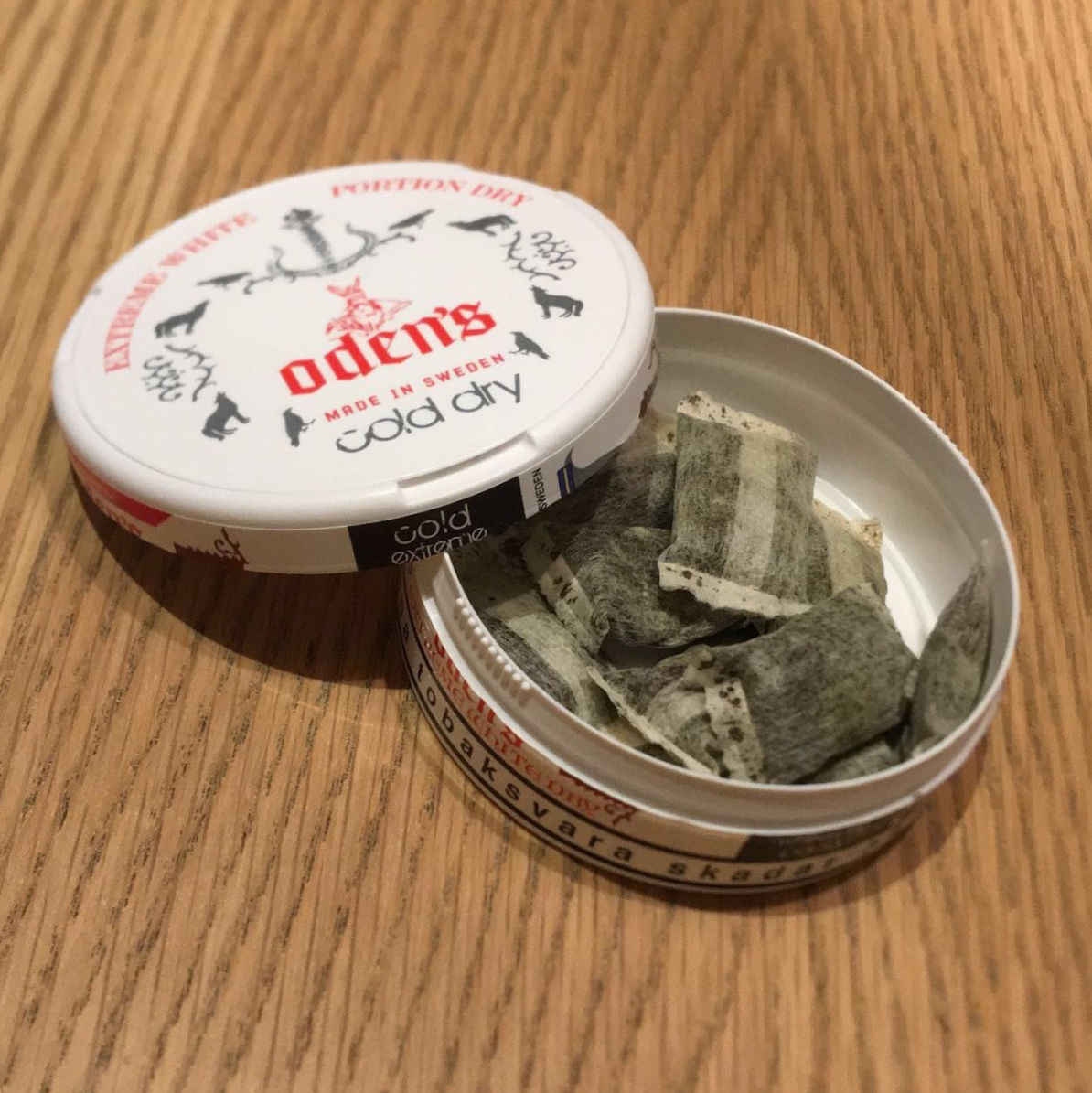 Avattu kiekko Oden's nuuskaa